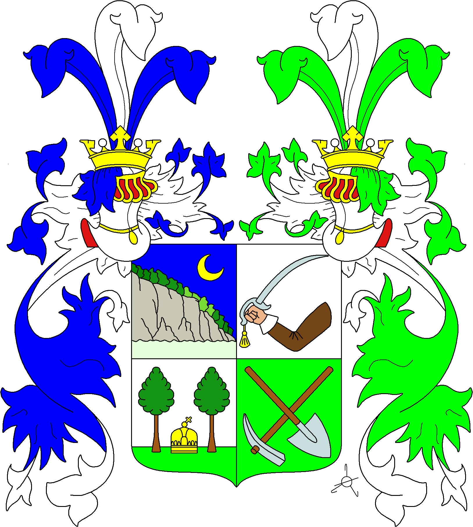 Grb Martina Imbriševića